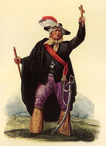 Miguel Hidalgo, en Uniformes Civiles y Militares